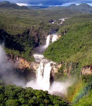 Salto do Parque Nacional da Chapada dos Veadeiros